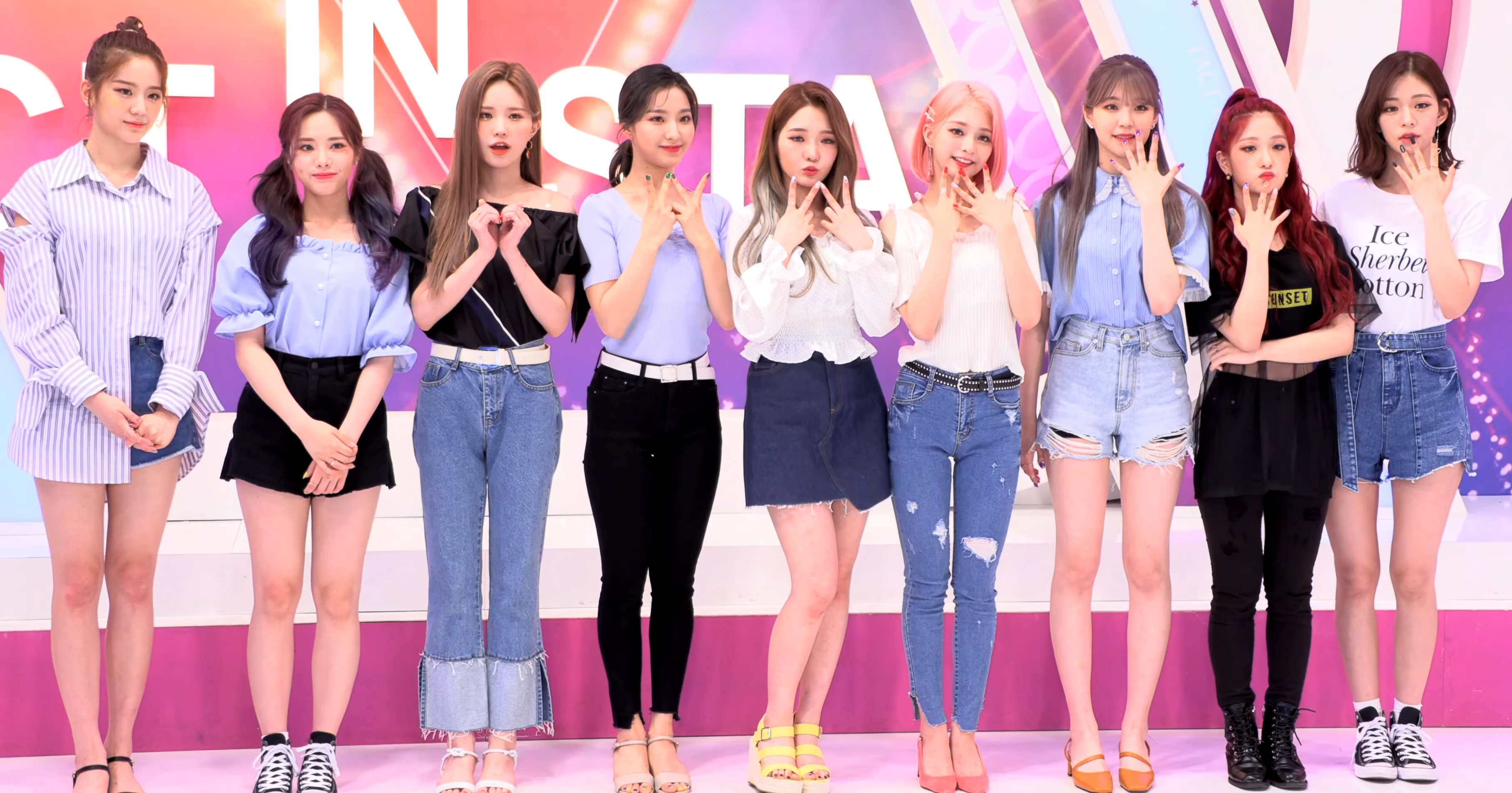 190611 프로미스나인(fromis 9) tbs 팩트인스타